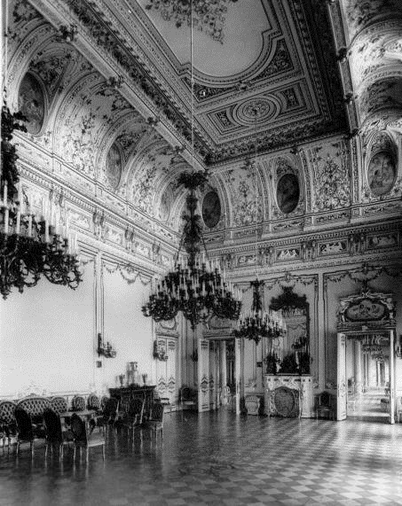 Жёлтая гостиная Ново-Михайловского дворца в Санкт-Петербурге.